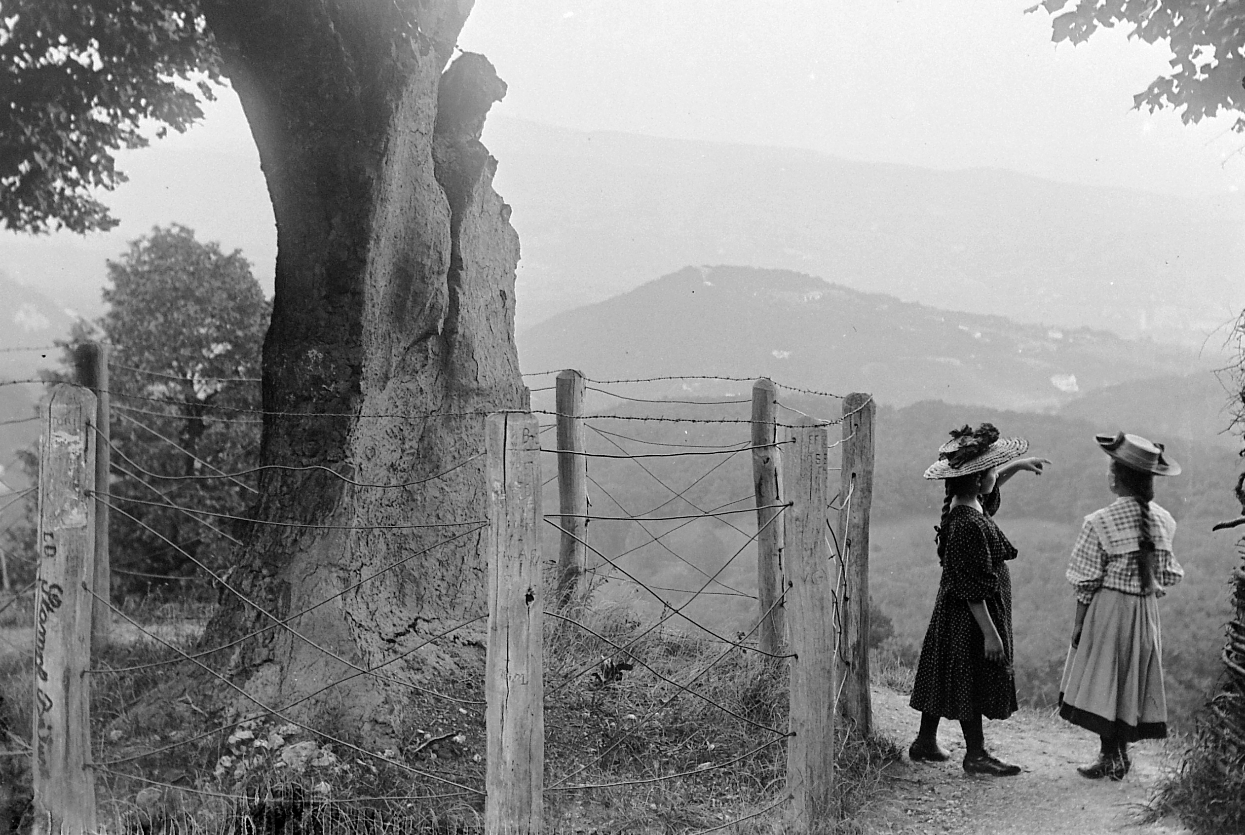 Normafa maradányai 1900